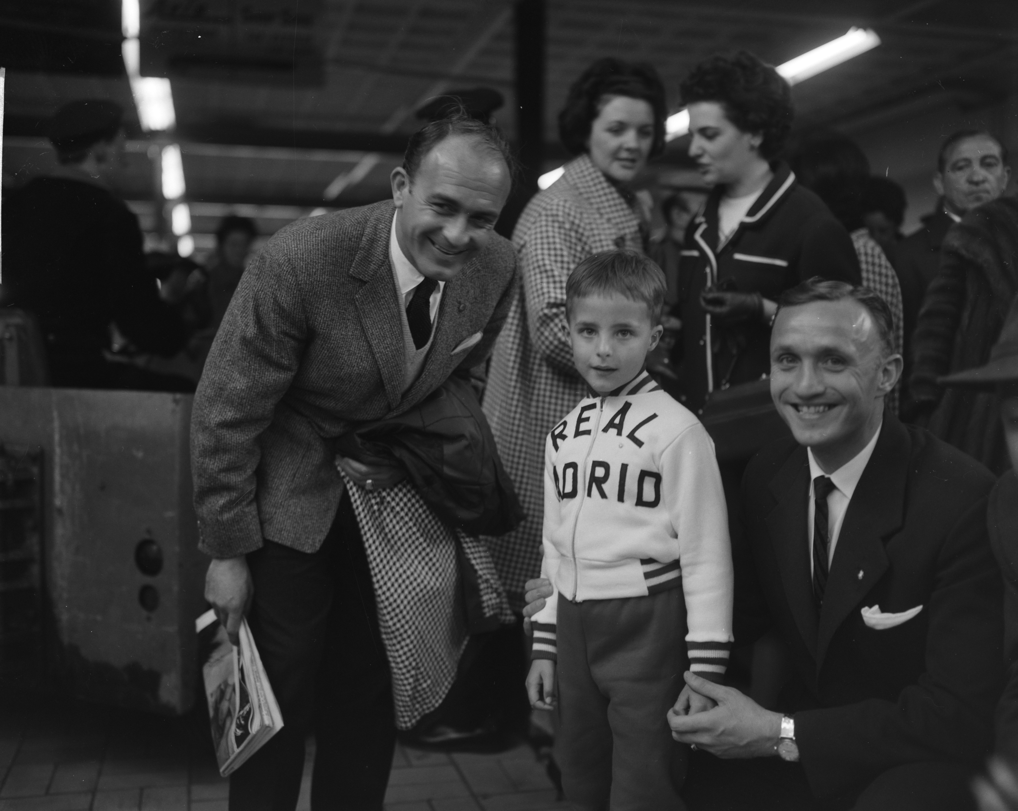 Alfredo Di Stéfano en Santamaria op Schiphol Collectie / Archief : Fotocollectie Anefo Reportage / Serie : [ onbekend ] Beschrijving : Real Madrid op Schiphol ( Di Stefano en Santamaria Datum : 29 april 1962 Locatie : Noord-Holland, Schiphol Trefwoorden : sport, vlegvelden, voetbal Persoonsnaam : Santamaria, José, Stefano, Alfredo di Instellingsnaam : Real Madrid, Santa Maria Fotograaf : Bilsen, Joop van / Anefo Auteursrechthebbende : Nationaal Archief Materiaalsoort : Negatief (zwart/wit) Nummer archiefinventaris : bekijk toegang 2.24.01.04